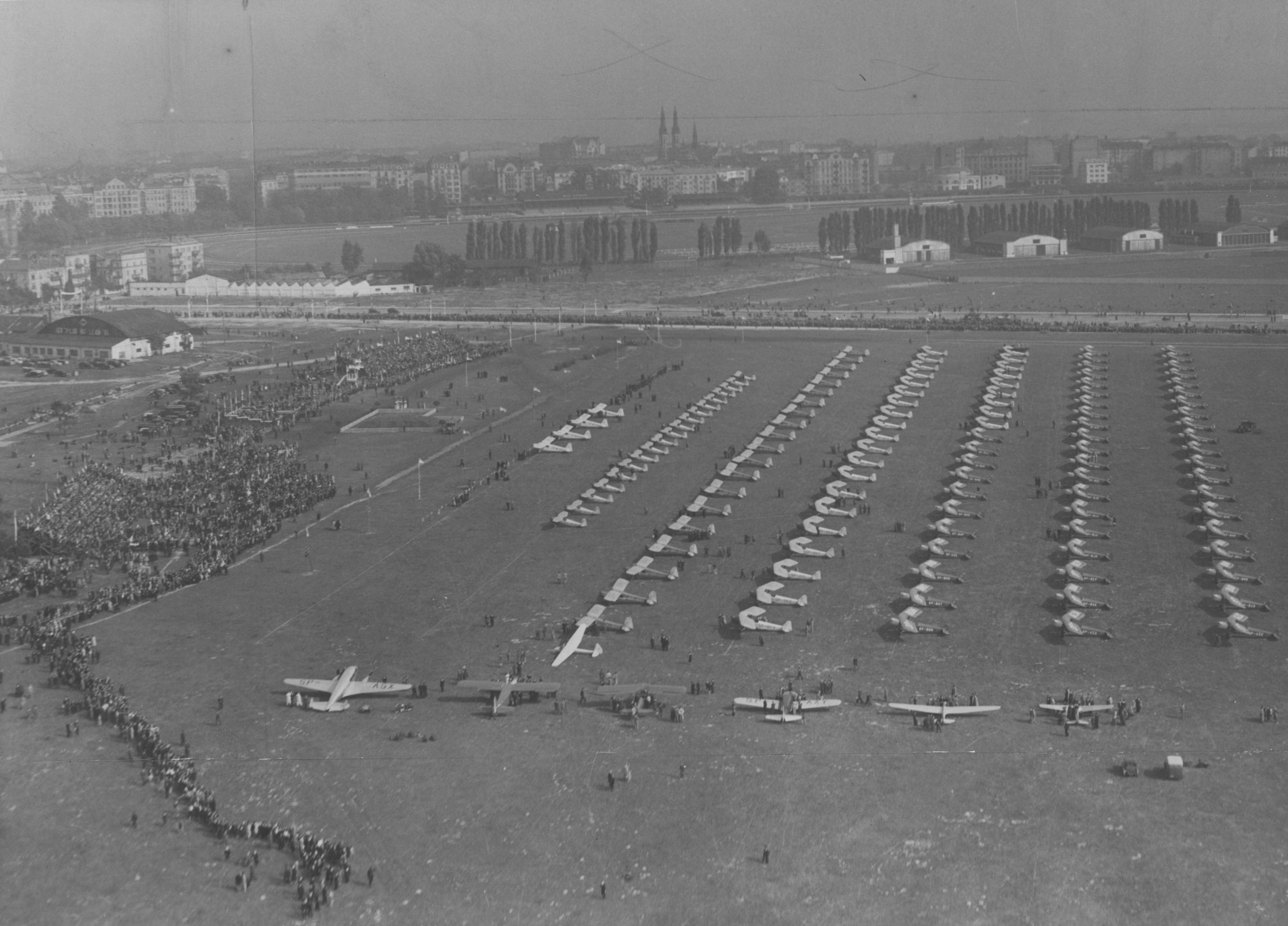 Pole Mokotowskie w Warszawie: przekazanie wojsku 126 samolotów ufundowanych przez społeczeństwo.